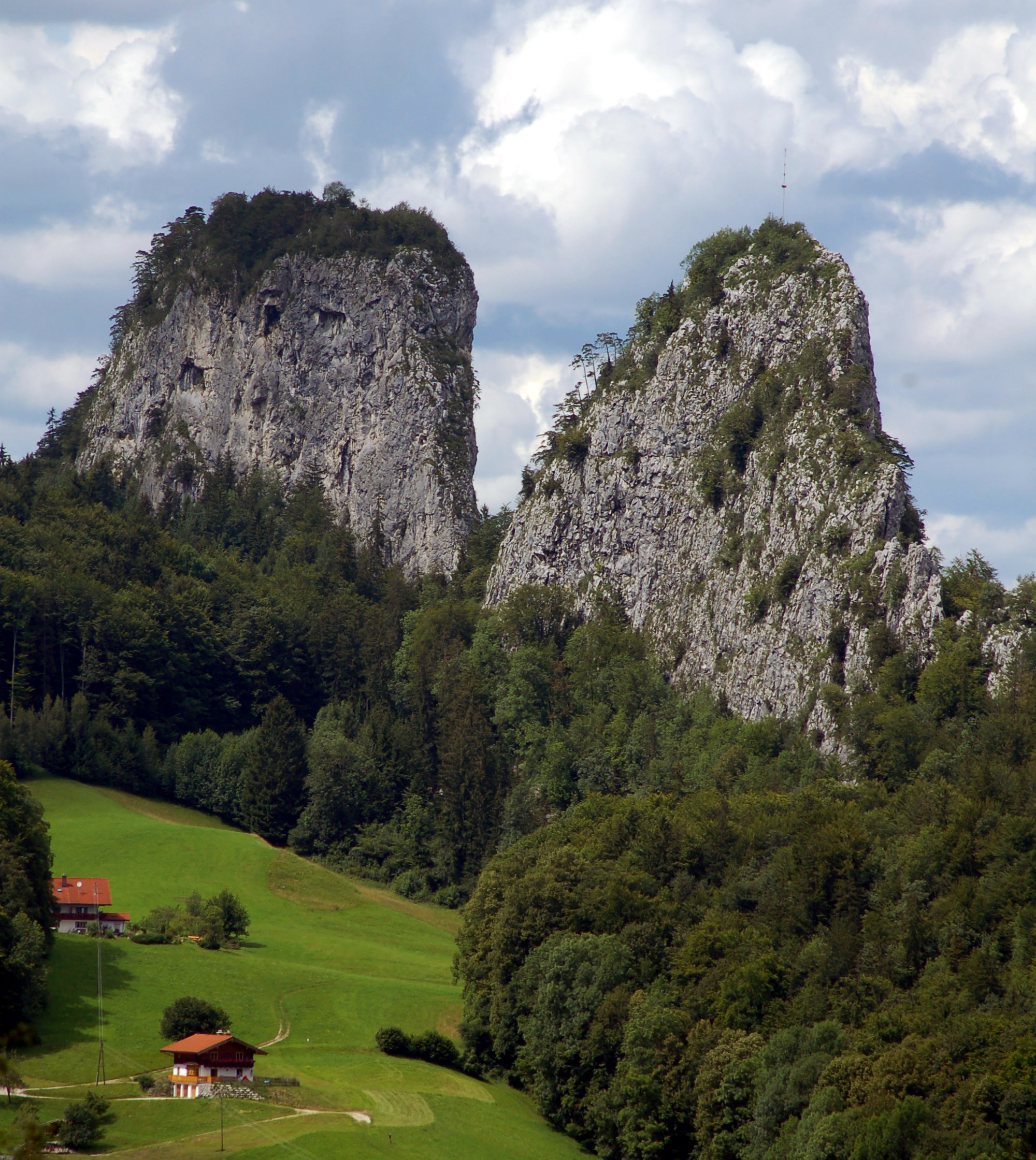 Großer (851m, links) und Kleiner Barmstein (840m, rechts) von Dürrnberg aus.